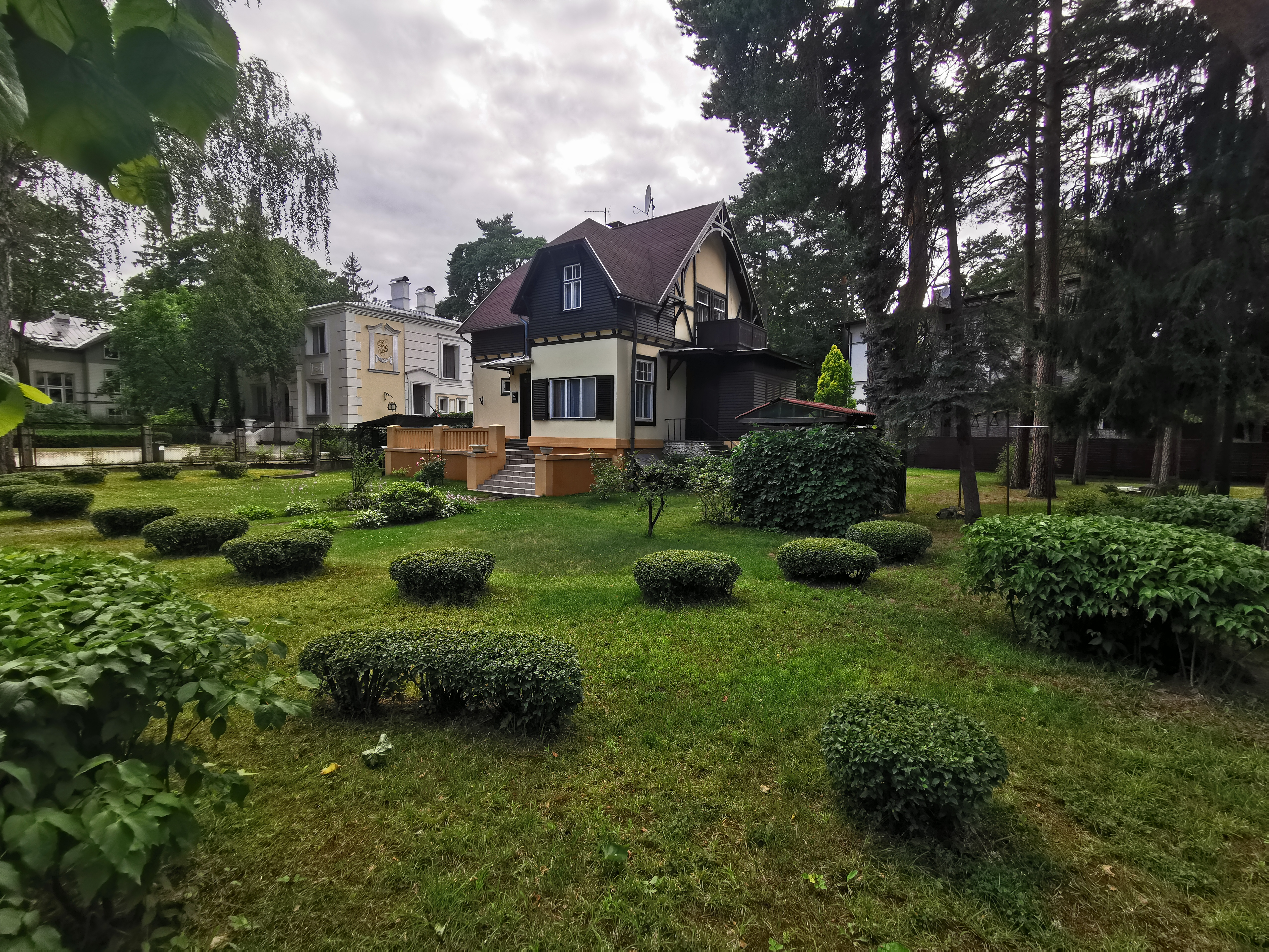 Вилла Мейерс Год постройки: 1903 Архитектор: Мандельштам, Пауль Гиршевич